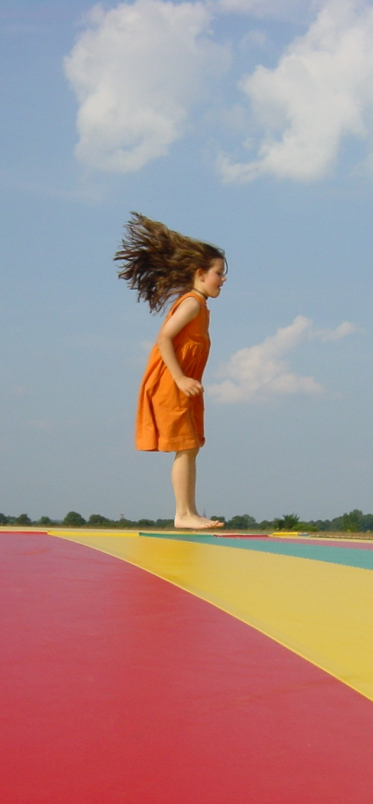 Tochter hüpft auf Hüpfkissen. Hüpfen macht glücklich.